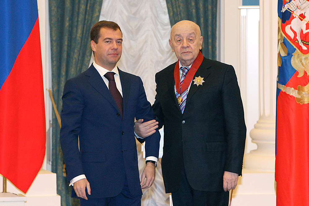 Церемония награждения Орденом «За заслуги перед Отечеством» II степени